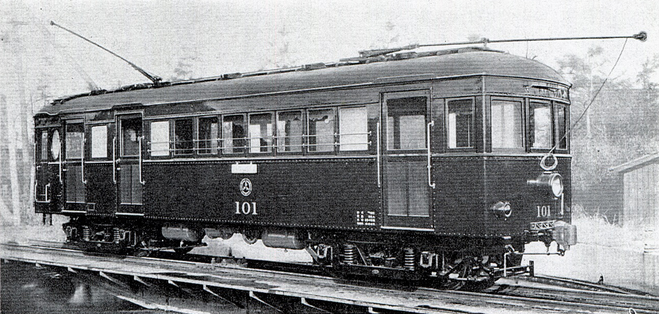 東美鉄道デボ100形101号車。製造元の日本車輌製造本店にて落成時に撮影された形式写真。